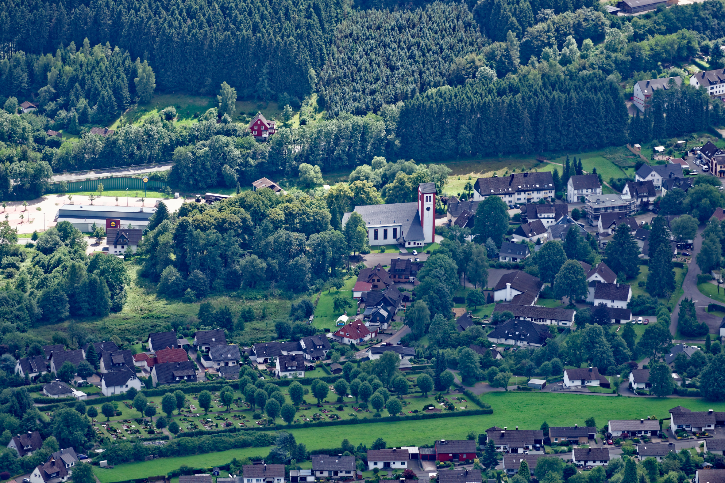 Luftaufnahme: Meinerzhagener Ortsteil Valbert mit Friedhof und Ev.Kirche, Nordrhein-Westfalen.